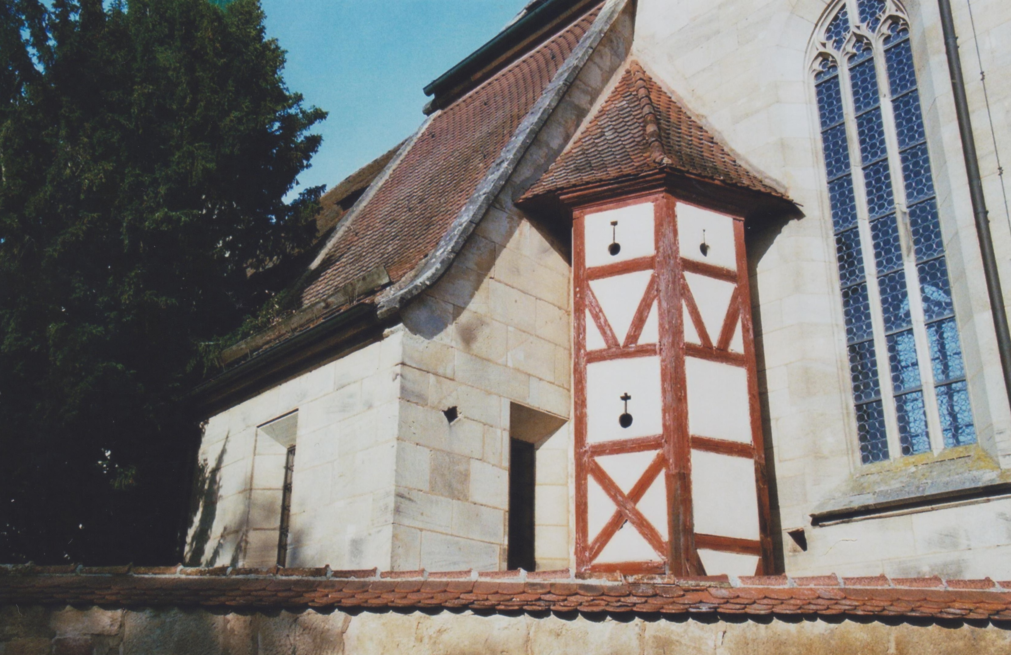 Rieterkirche Kalbensteinberg, Sakristei an der Südwand des Chores und Fachwerkturm mit Aufstieg zur Herrschaftsloge